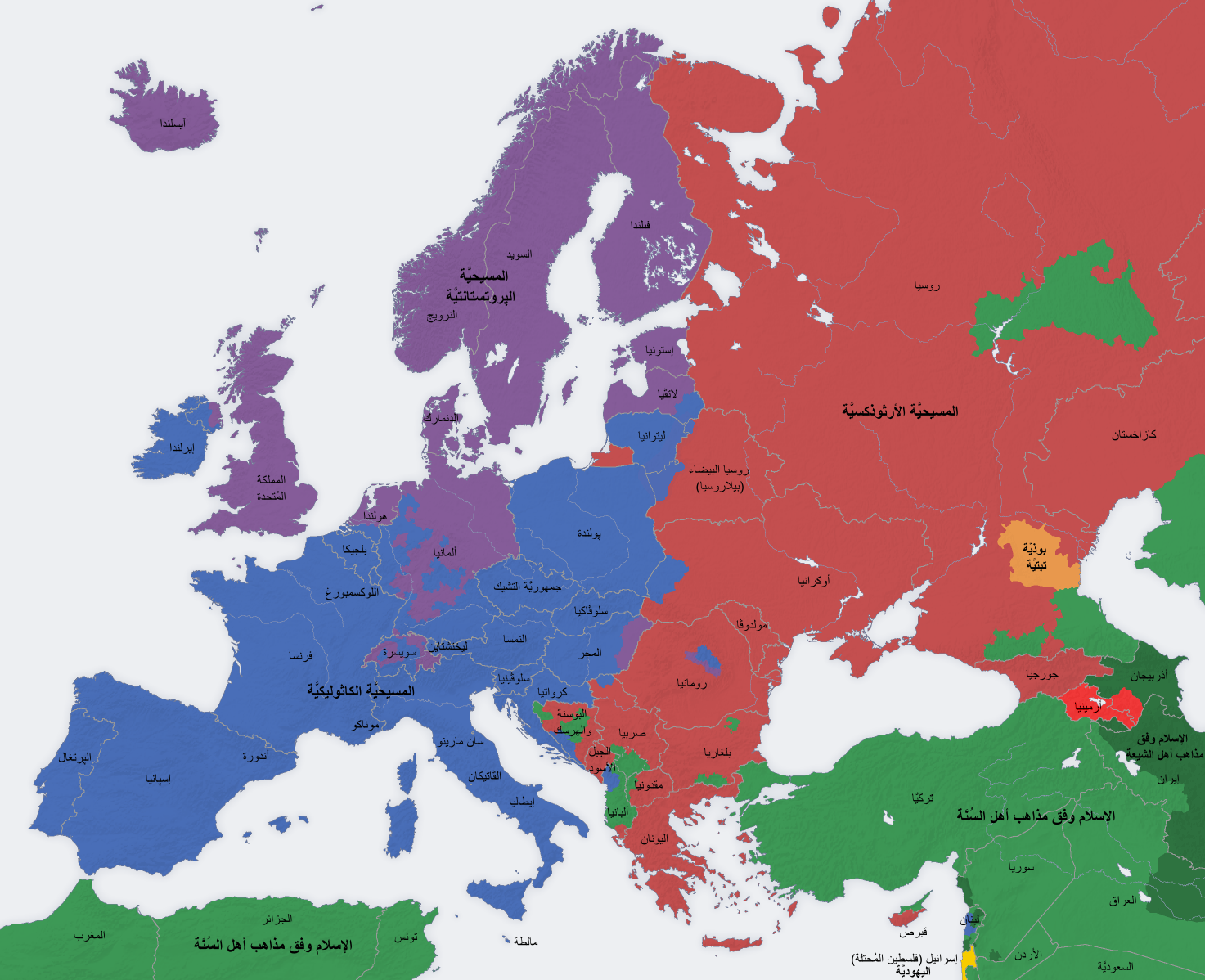 خارطة تُظهر توزّع الديانات في أوروپَّا والأقاليم المُجاورة في آسيا الغربيَّة وشمال أفريقيا. كاثوليكية أرثوذكسية شرقية بروتستانتية ,أنجليكية أرثوذكسية مشرقية إسلام سني إسلام شيعي بوذية تبتية يهودية